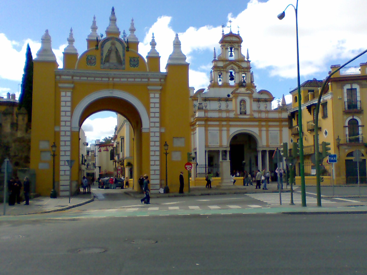 Arco y Basílica de la Virgen Macarena (Sevilla)